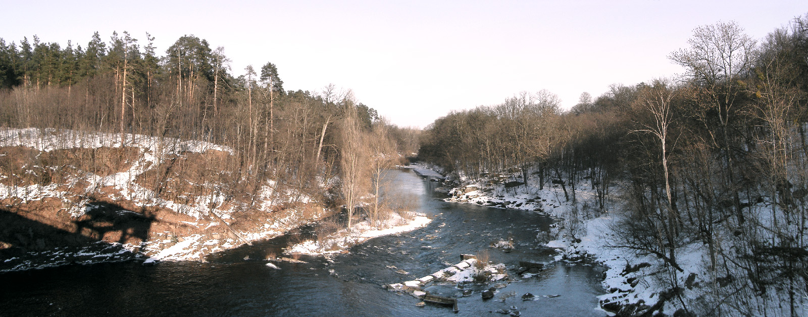 Над Тетеревом, Житомирський р-н, землі КЕЧ Житомирського р-ну, Тригірське лісництво, кв. 13, вид. 24, 25, 30; кв.18, вид. 2, 3, 4; кв.19, вид. 1, 2, 3, 4, 7; кв. 20, вид. 1.